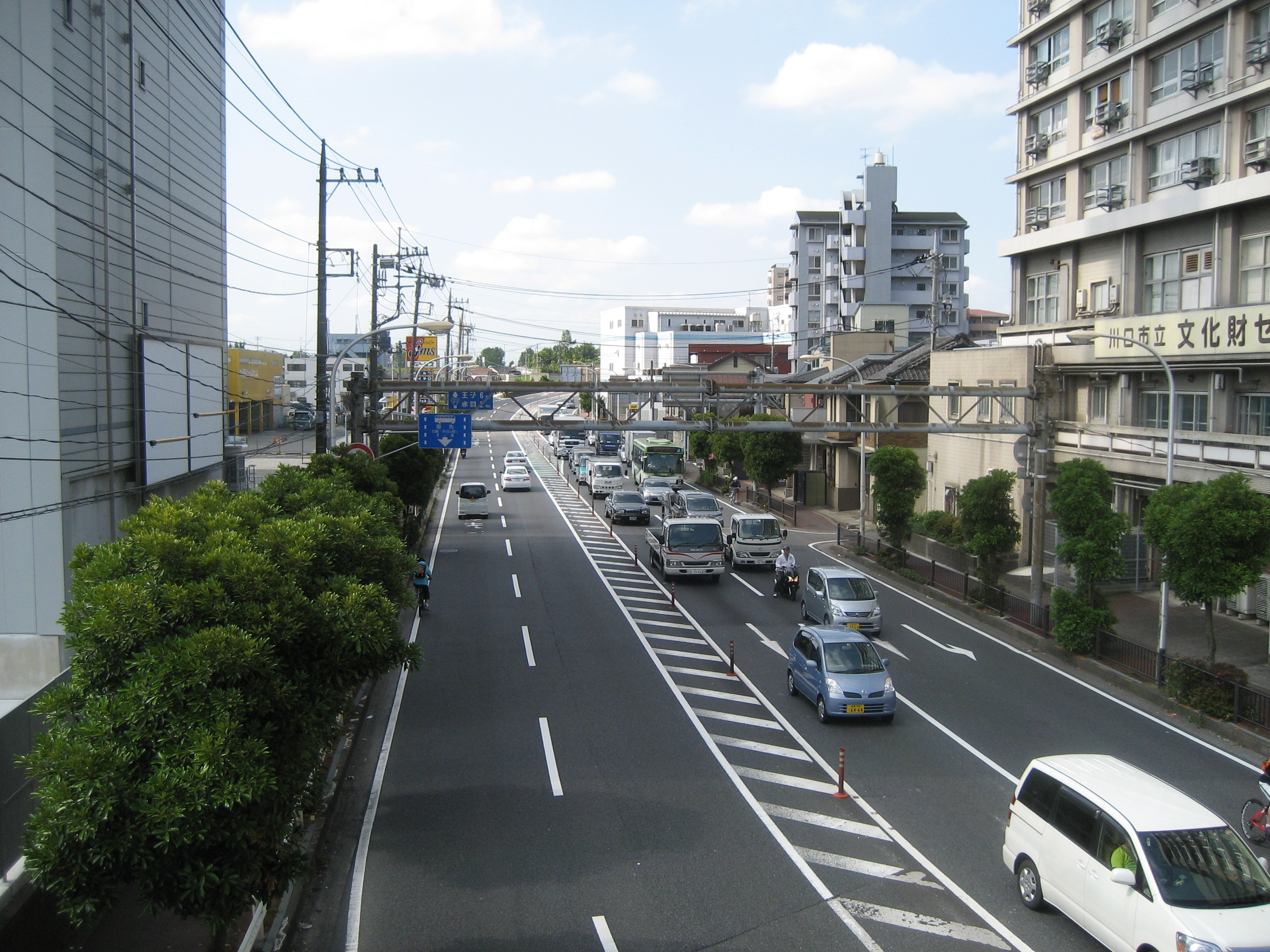 国道１２２号線埼玉県川口市本町１丁目付近赤羽方面を撮影